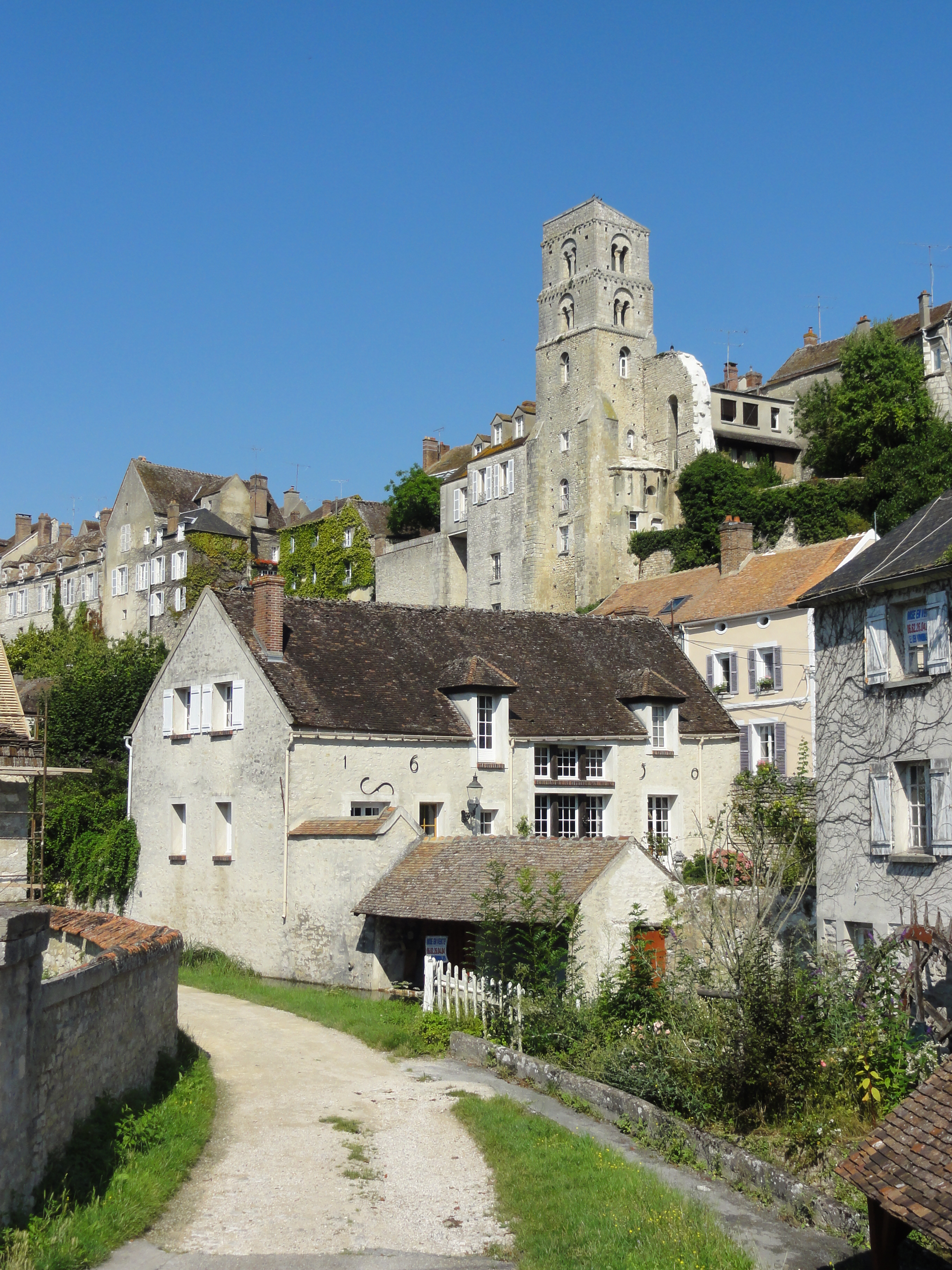 Tour Saint-Thugal, vue depuis le sud-est.